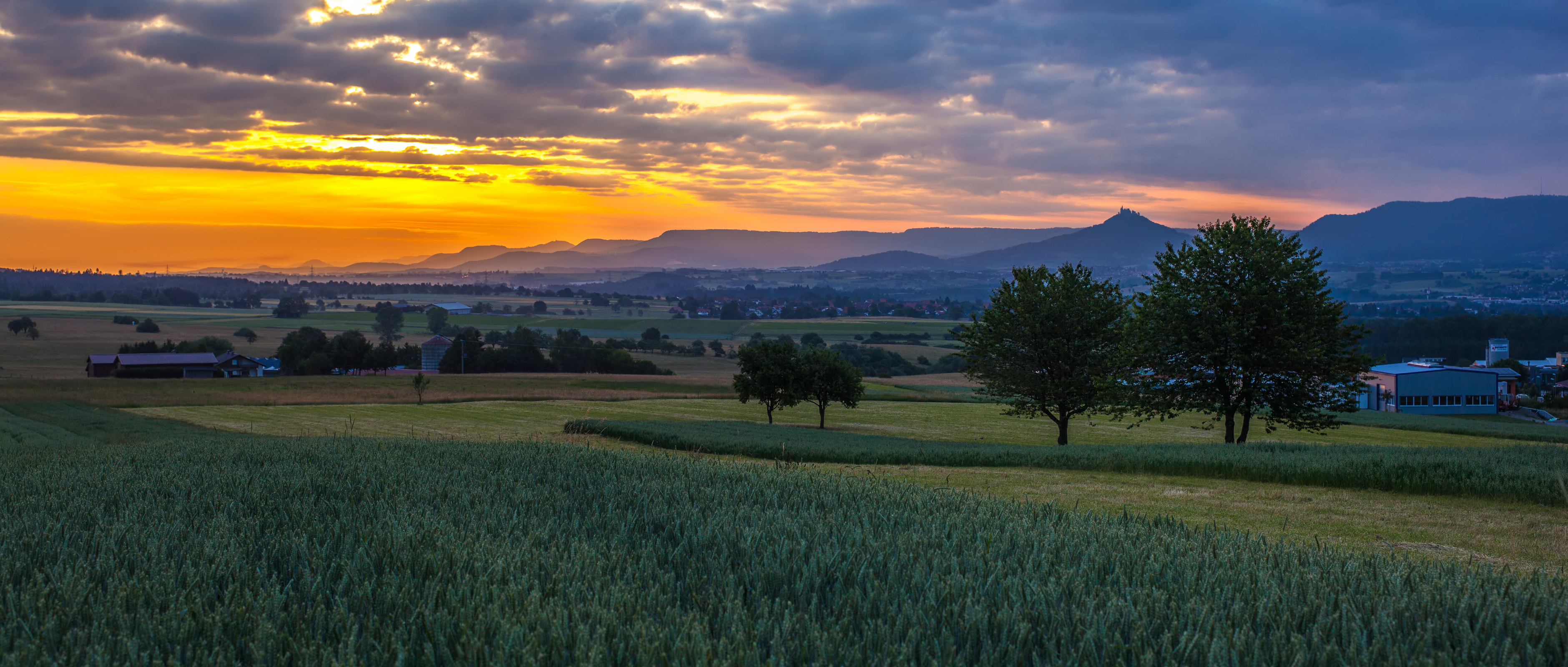 Zollernalbkreis nördlich von Geislingen